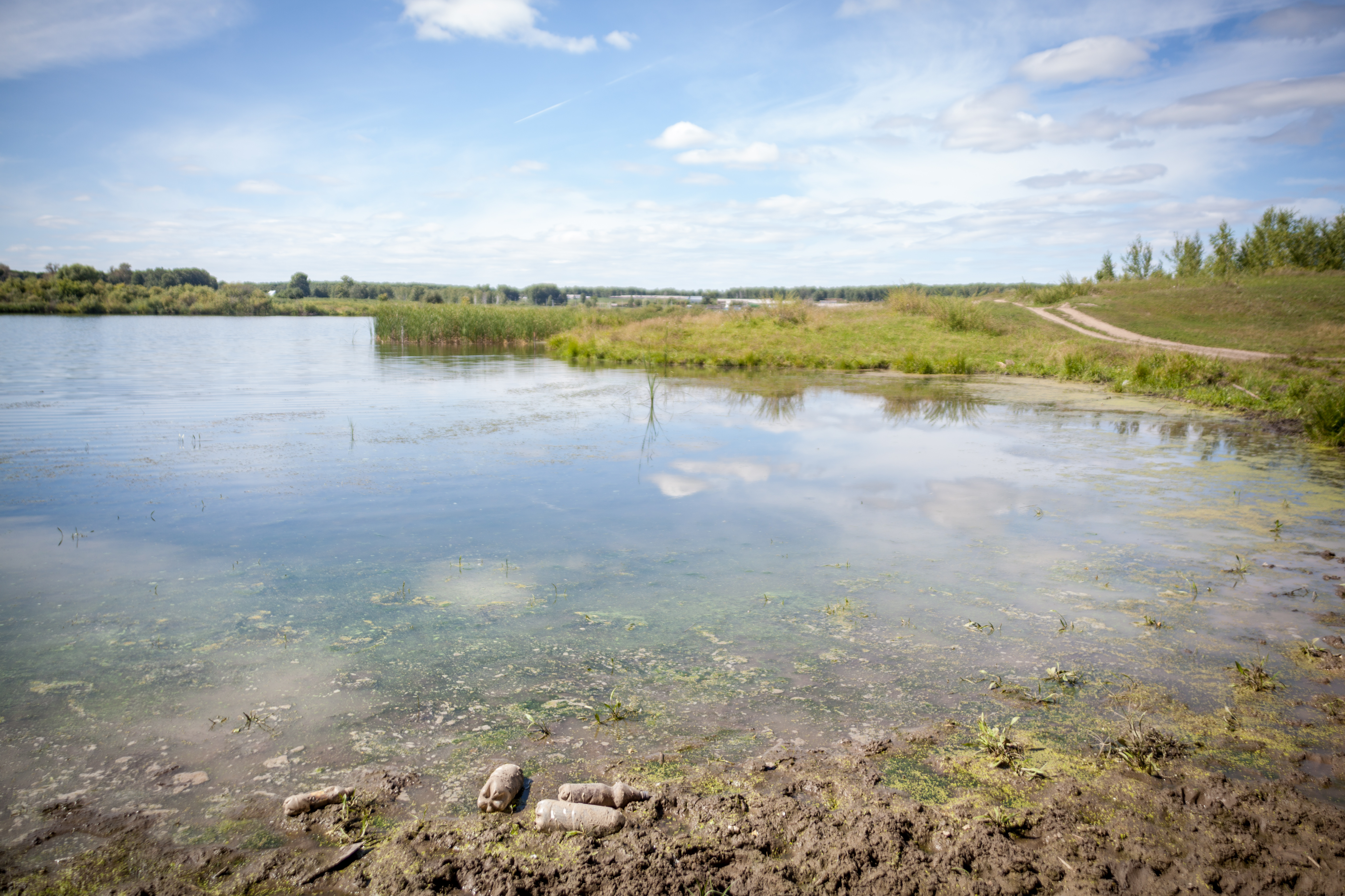 Lake in siberia